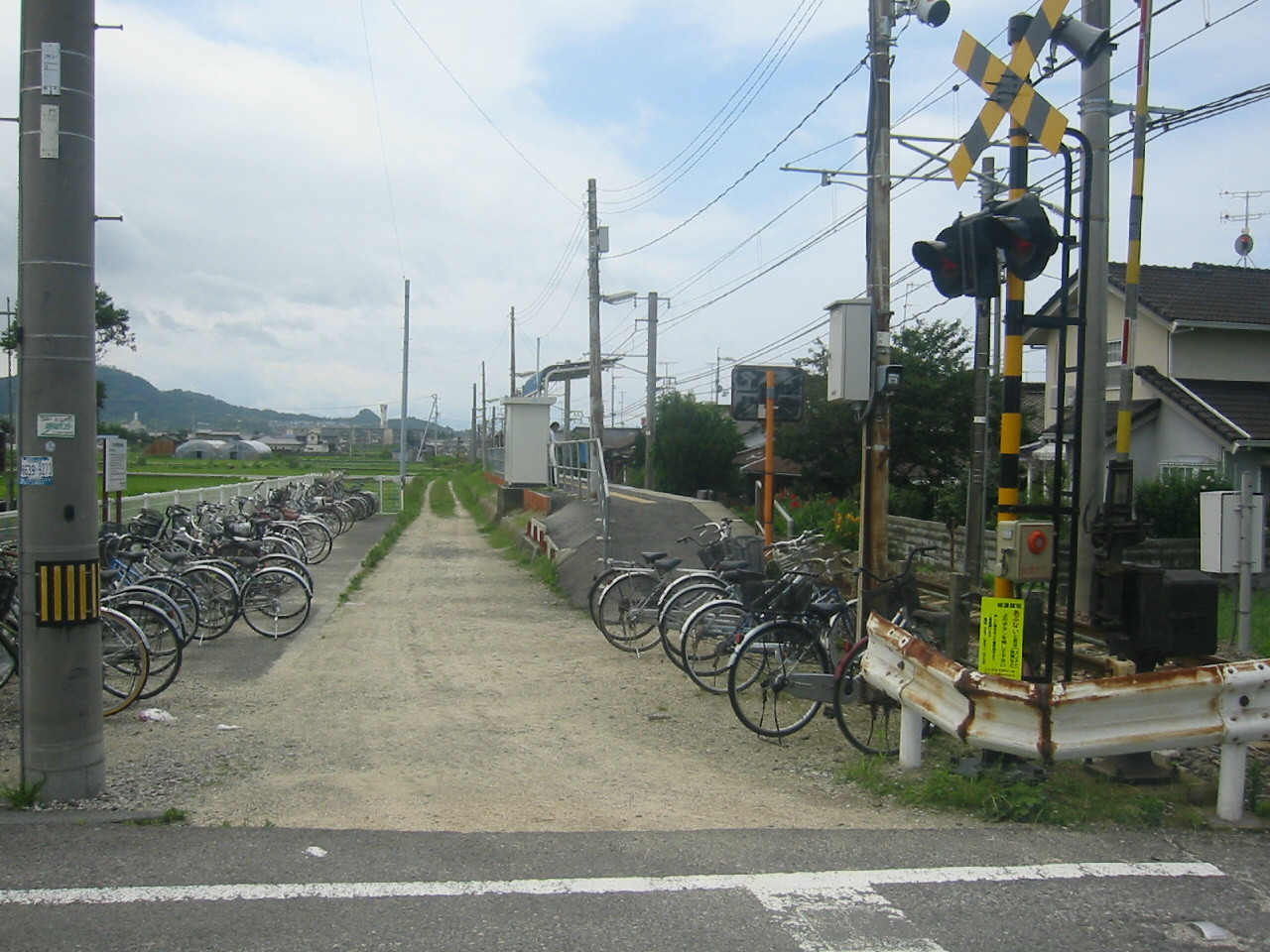 jr yanagihara station